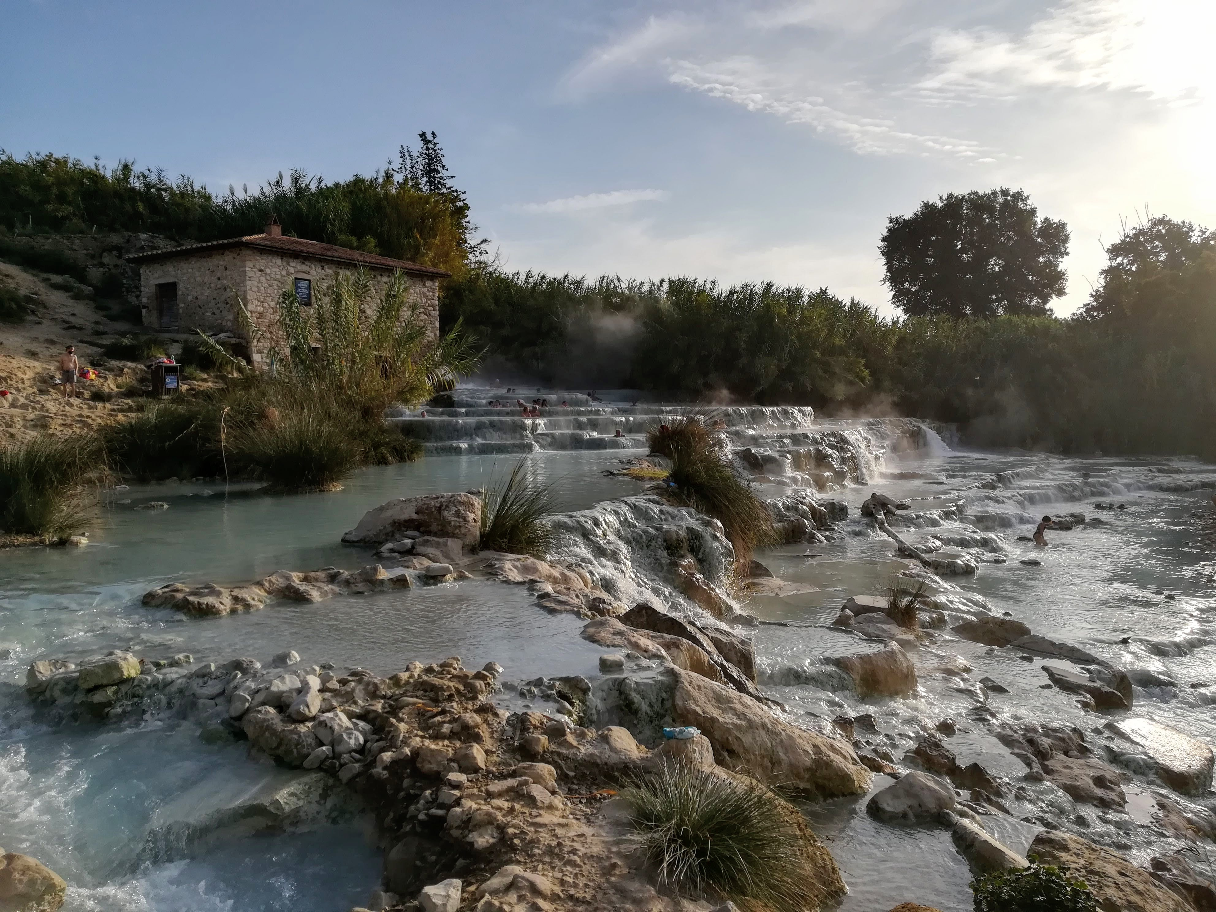 Cascate del Mulino a Saturnia al mattino